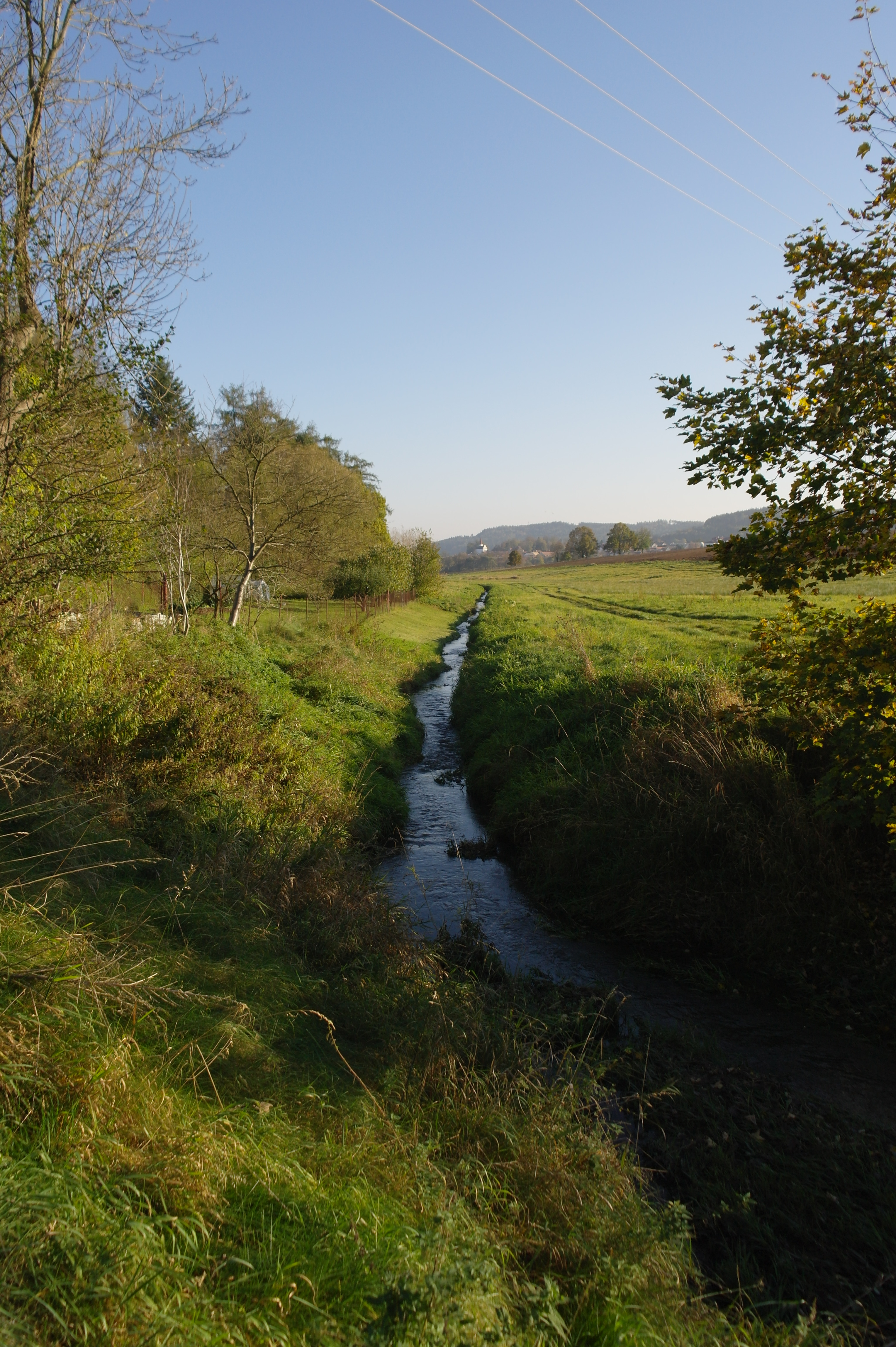 Dubský potok u vesnice Javornice, část městyse Dub.